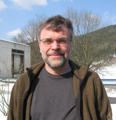 Foto di Siegfried Echterhoff